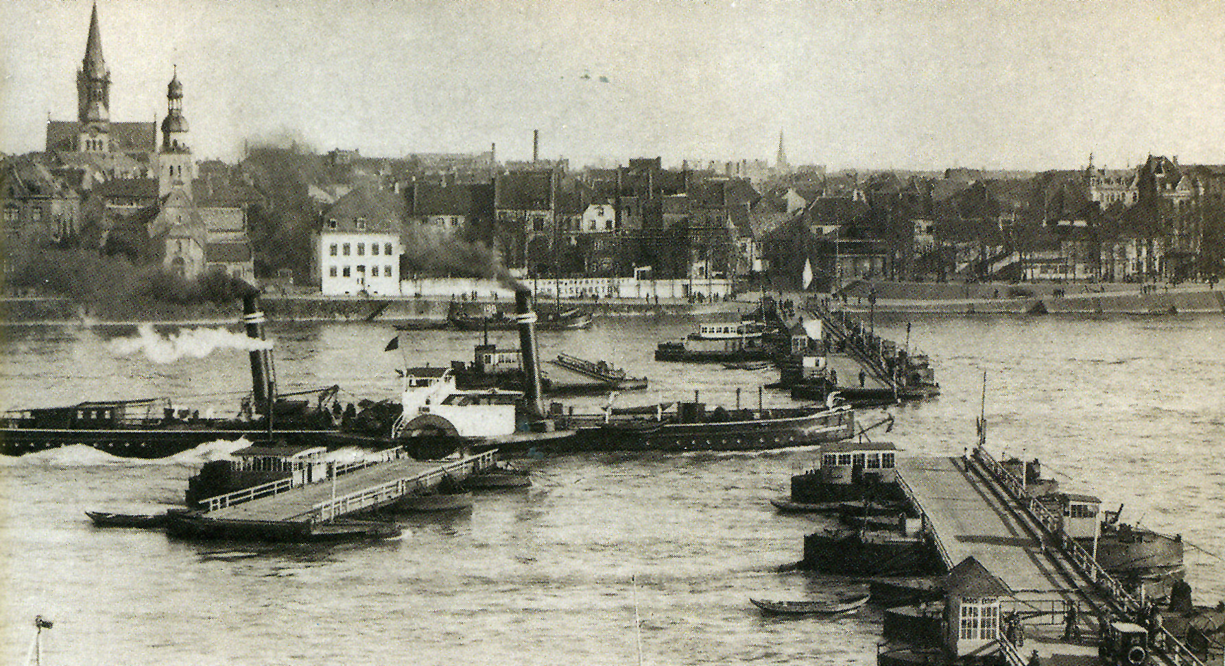 Mülheimer Schiffbrücke um 1888 (previously Mainzer Schiffsbrücke)